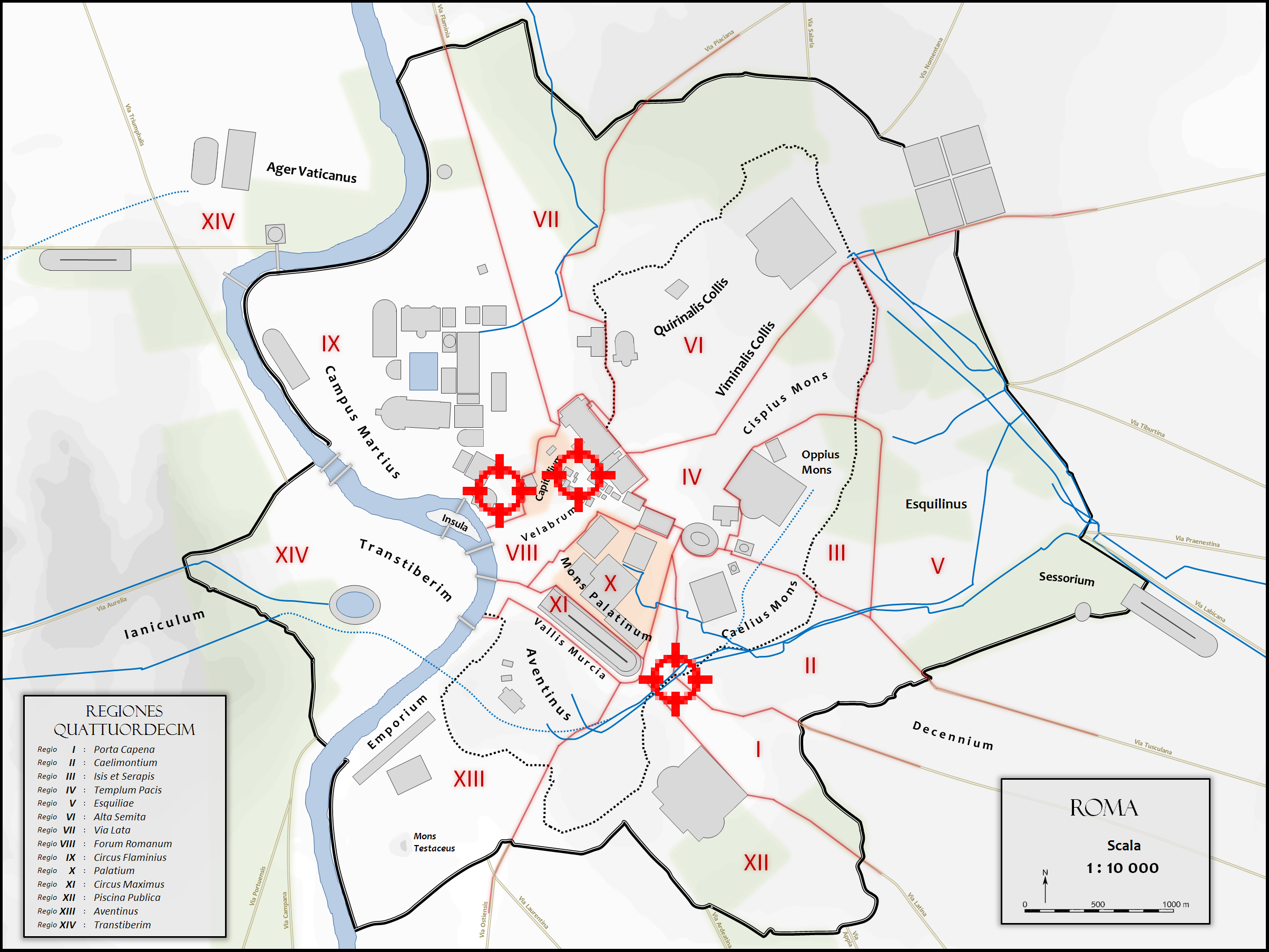 Localisation des Senacula dans la Rome antique